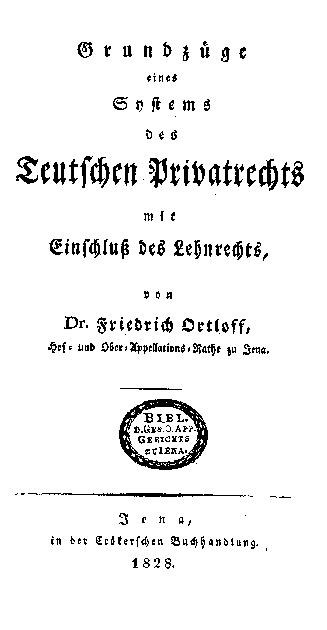 Friedrich Ortloff 1797-1868 "Deutsche Privatrecht" 1828